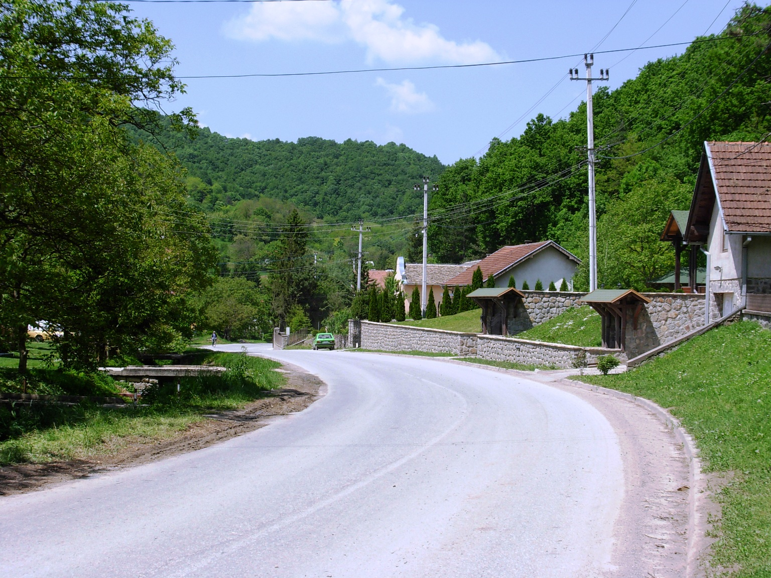 Manastirska ulica u Rakovcu.